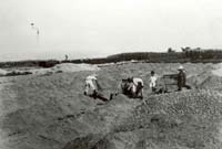 japan emigrant in Taiwan zn:日本移民村